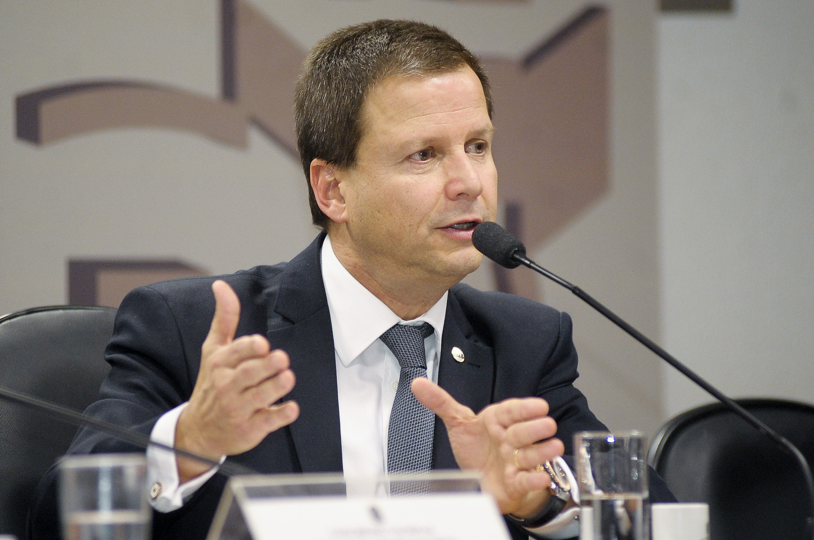 Conselho de Comunicação Social (CCS) realiza reunião de comissões temáticas para designação de relatorias de matérias em tramitação no Congresso. Em pronunciamento, presidente do Conselho Federal da Ordem dos Advogados do Brasil (OAB), Cláudio Lamachia. Foto: Waldemir Barreto/Agência Senado